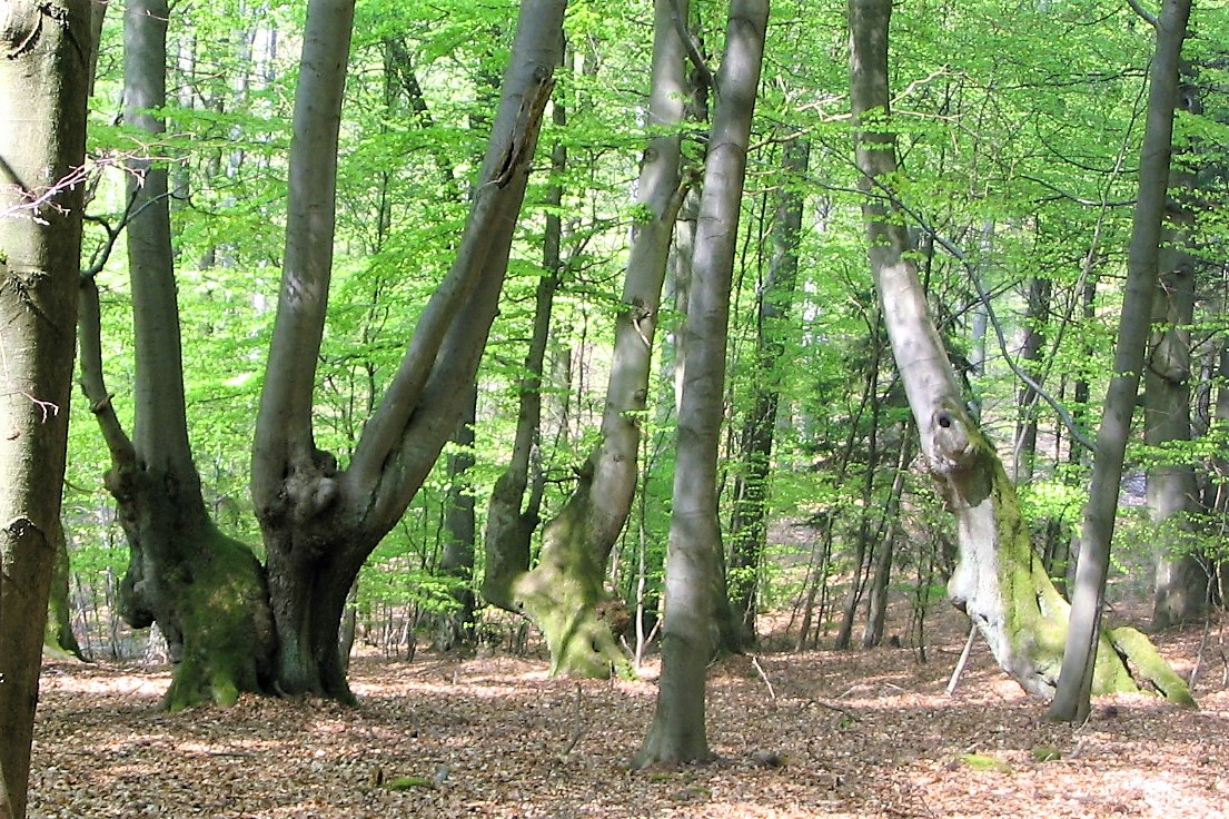 Drei alte Gebückbäume im Walddistrikt Wolfsrück nördlich des Erbacher Kopfs, erkennbar an den bis in Mannshöhe reichenden knorrigen Verwachsungen und Verzweigungen des Stamms